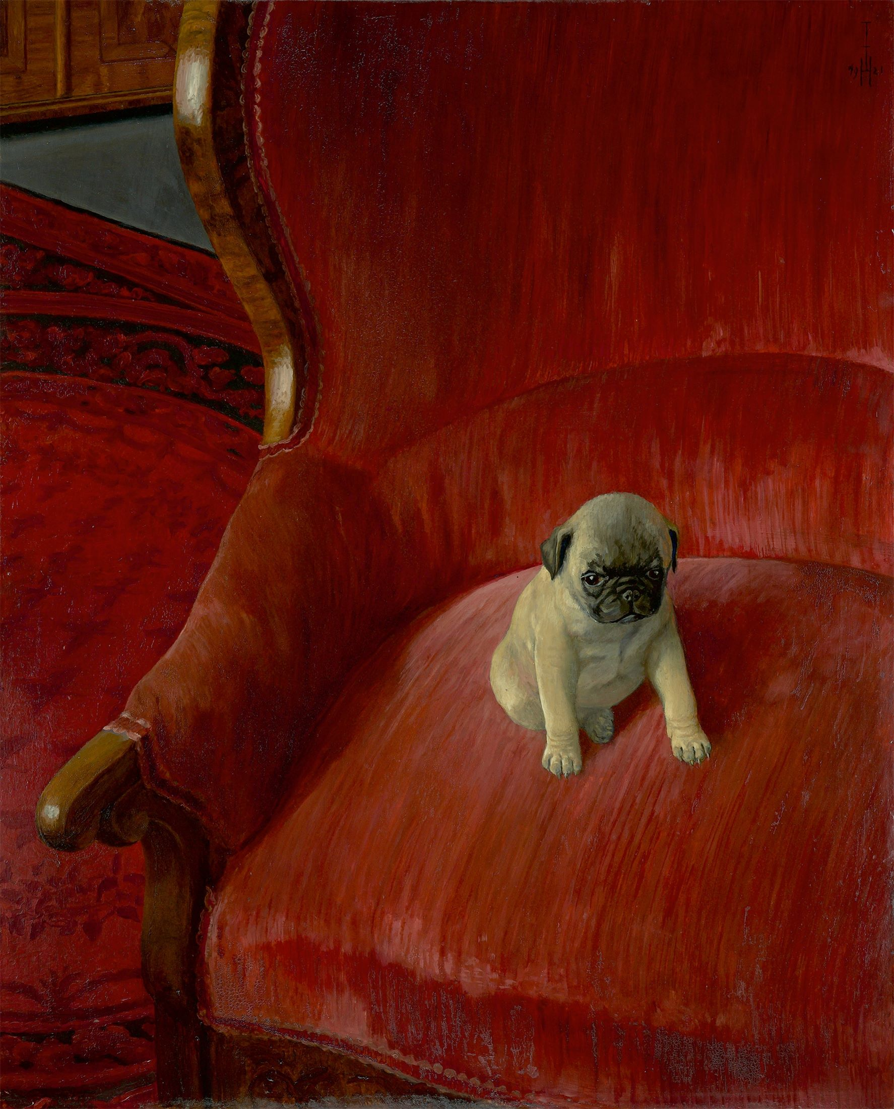 Thomas Theodor Heine: „Siegfried“. 1921, Öl auf Holz. 70,5 × 57 cm (27 3/4 × 22 1/2 in.)